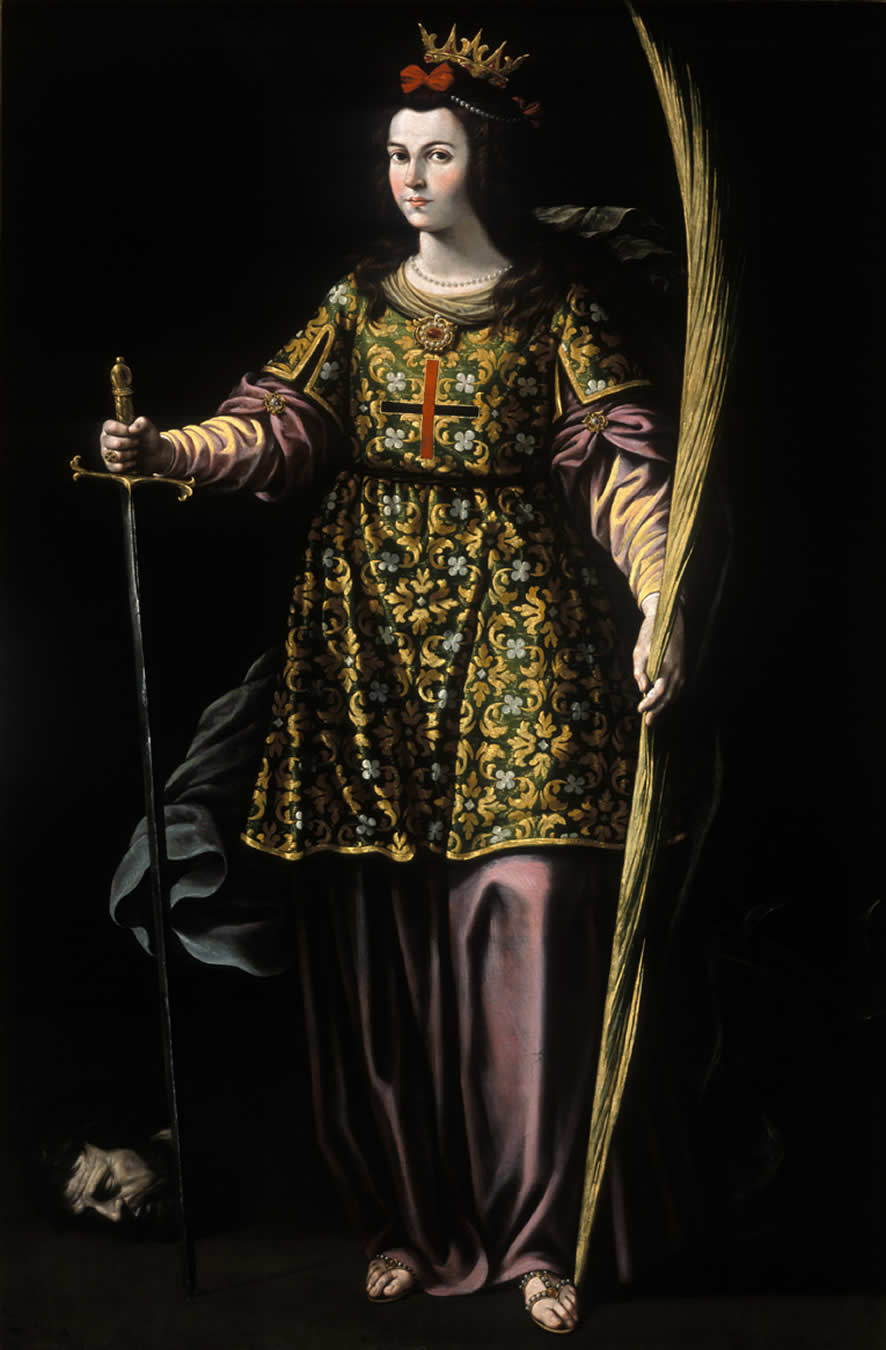 La obra representa a la mártir Santa Catalina de Alejandría.